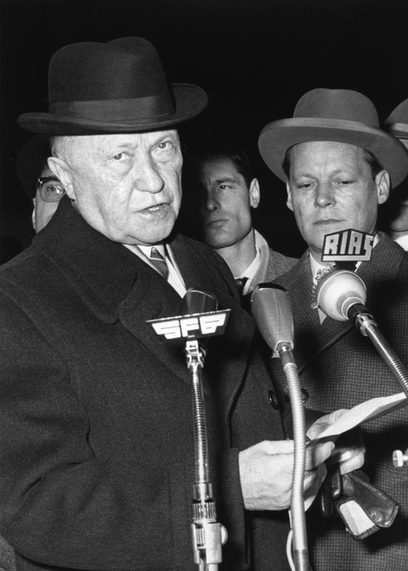 Nach dem Bau der Berliner Sperrmauer besuchte Bundeskanzler Konrad Adenauer am 22.8.1961 Berlin (West). Rechts neben ihm der Regierende Bürgermeiser Willy Brandt.